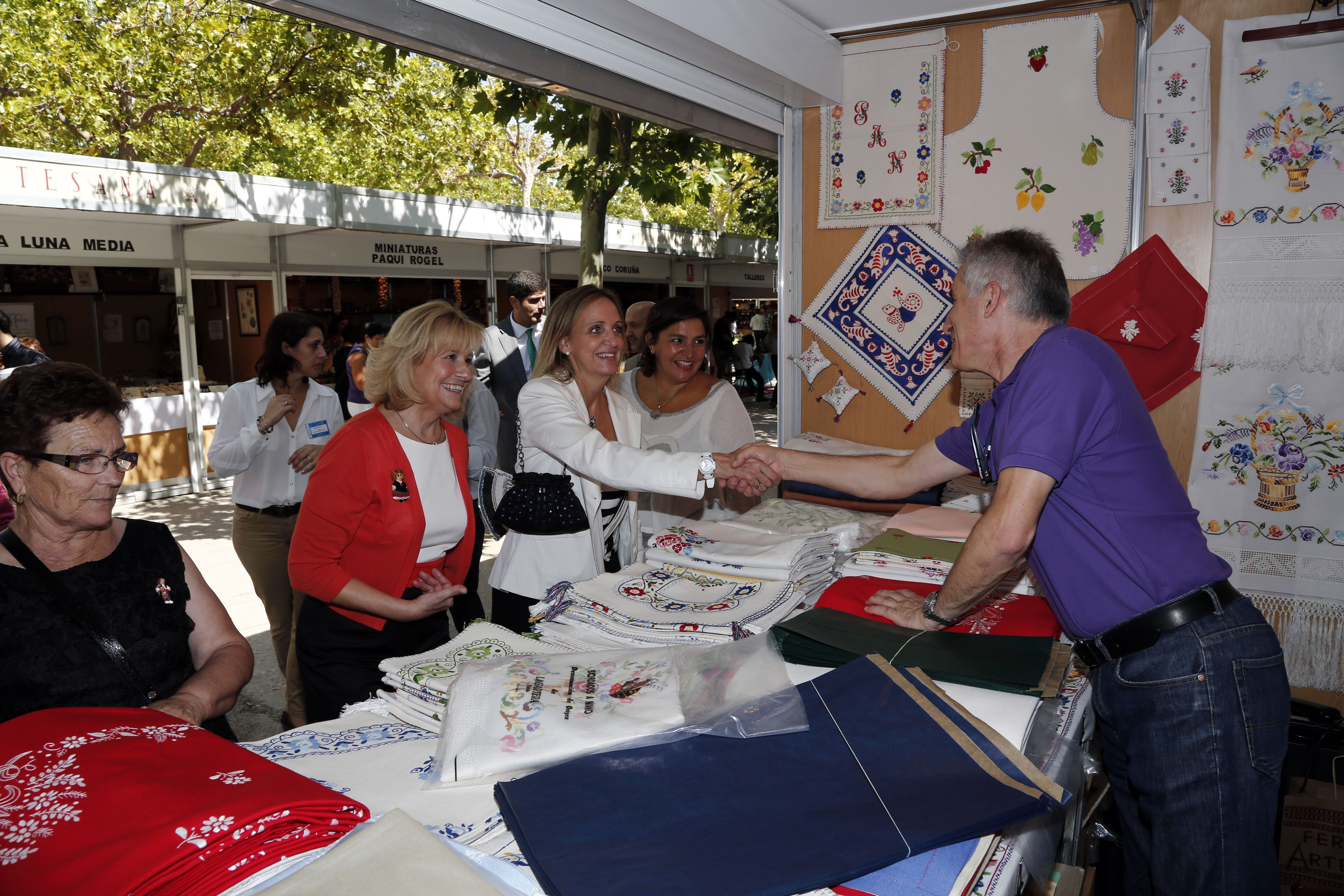 Carmen Casero, consejera de Empleo y Economía, visita la Feria de Artesanía "Artesana 2013 Albacete".